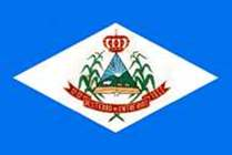 Bandeira de Desterro de Entre Rios - MG